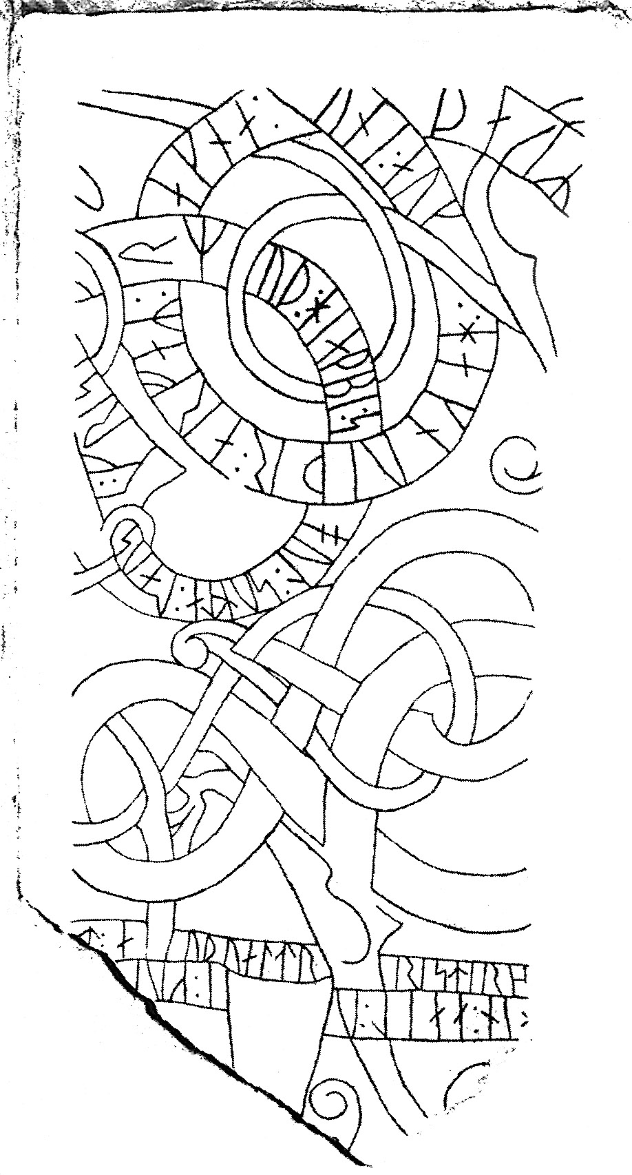 Gotlands runinskrifter 200